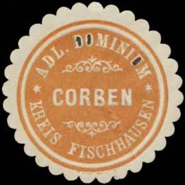 Sealing stamp Title: Adl. Dominium Corben Description: Gut Korben, Kreis Fischhausen, braun, weiß, geprägt Place: Korben size: 3 cm